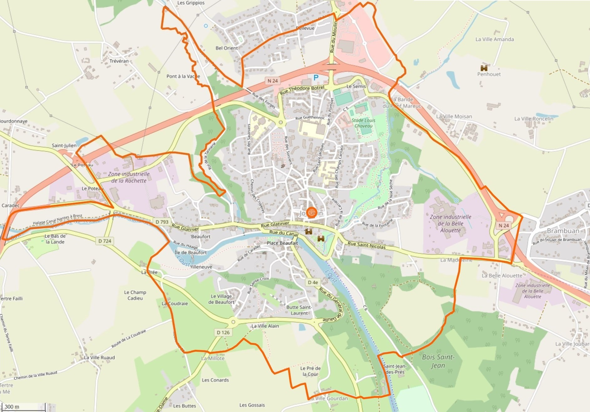 Cette carte a été créée à partir des données du site openstreetmap. This map may be incomplete, and may contain errors. Don't rely solely on it for navigation.